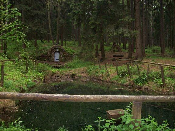 Warnsdorfer Quelle Date and/or time in the file Exif metadata are incorrect/invalid.